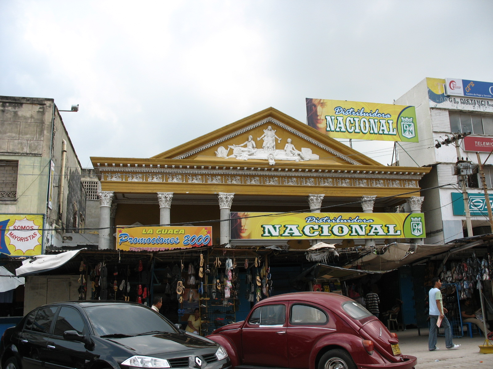 antoguo Banco Comercial de Barranquilla